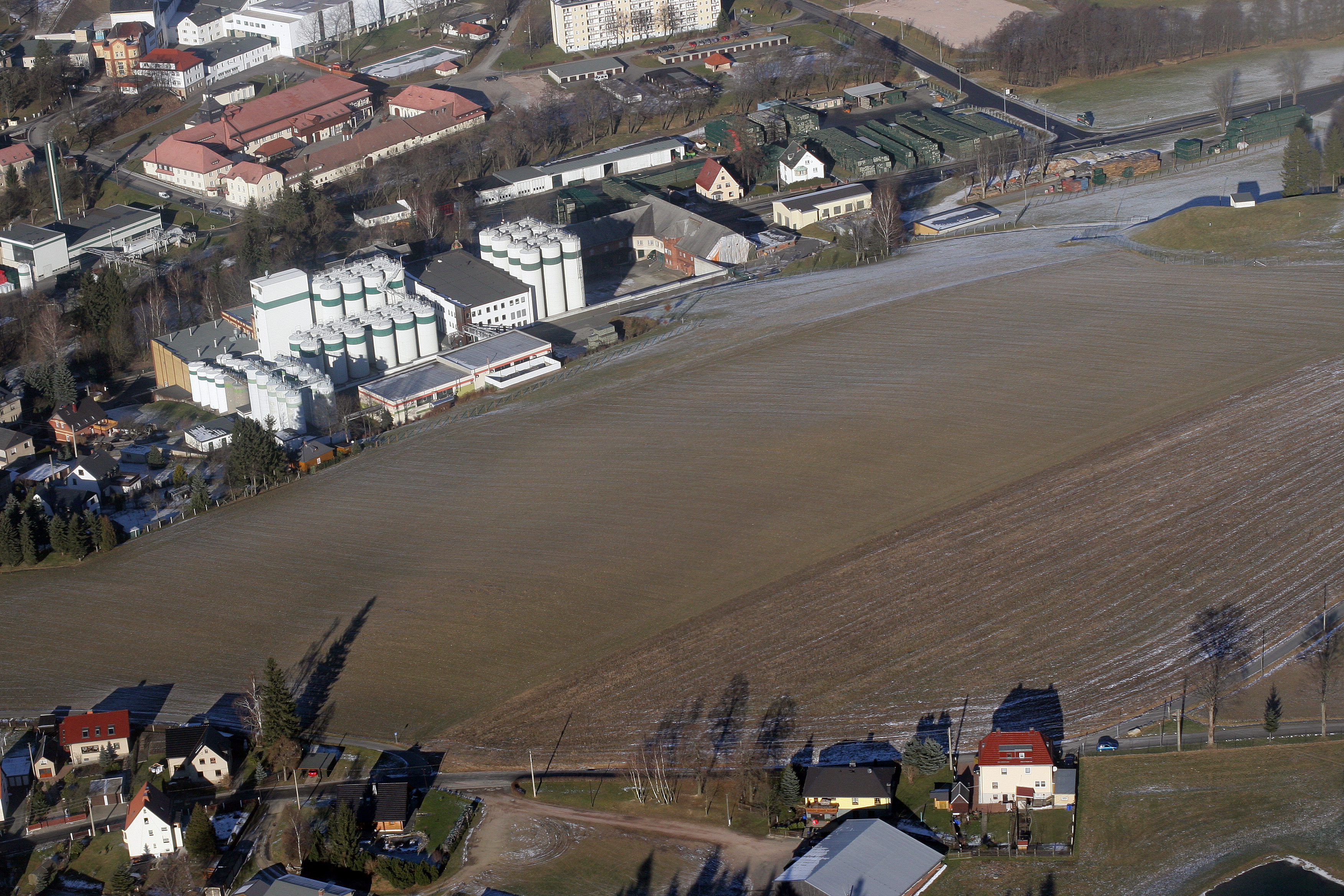 Brauerei Wernesgrün Luftaufnahme